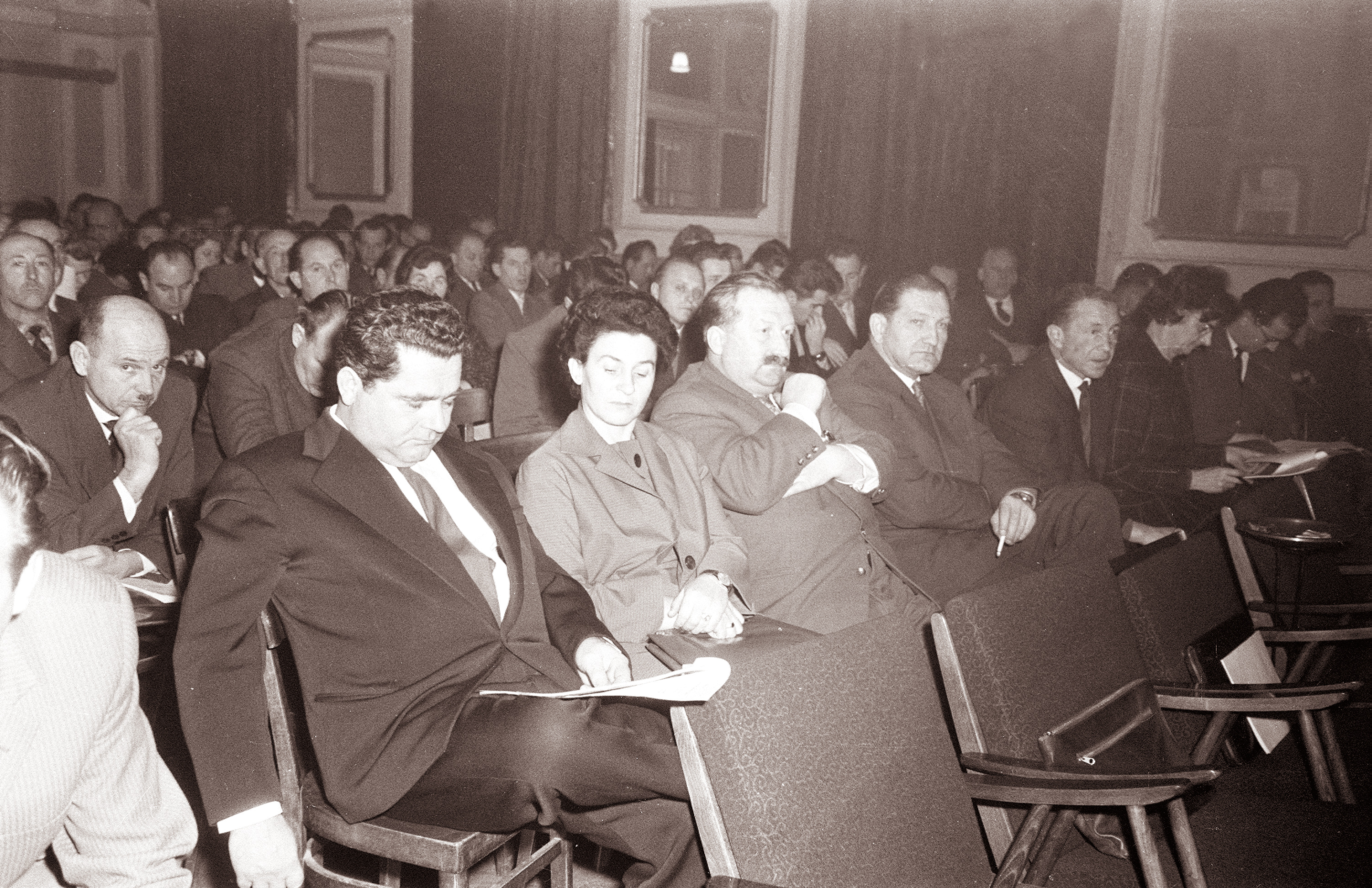 Delegati na konferenci SZDL mariborskega okraja 1962